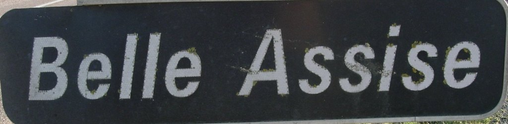 La Belle Assise.